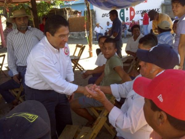 En Ixtepec CNC y PRI trabajarán unidos y fortalecidos de cara al 2012